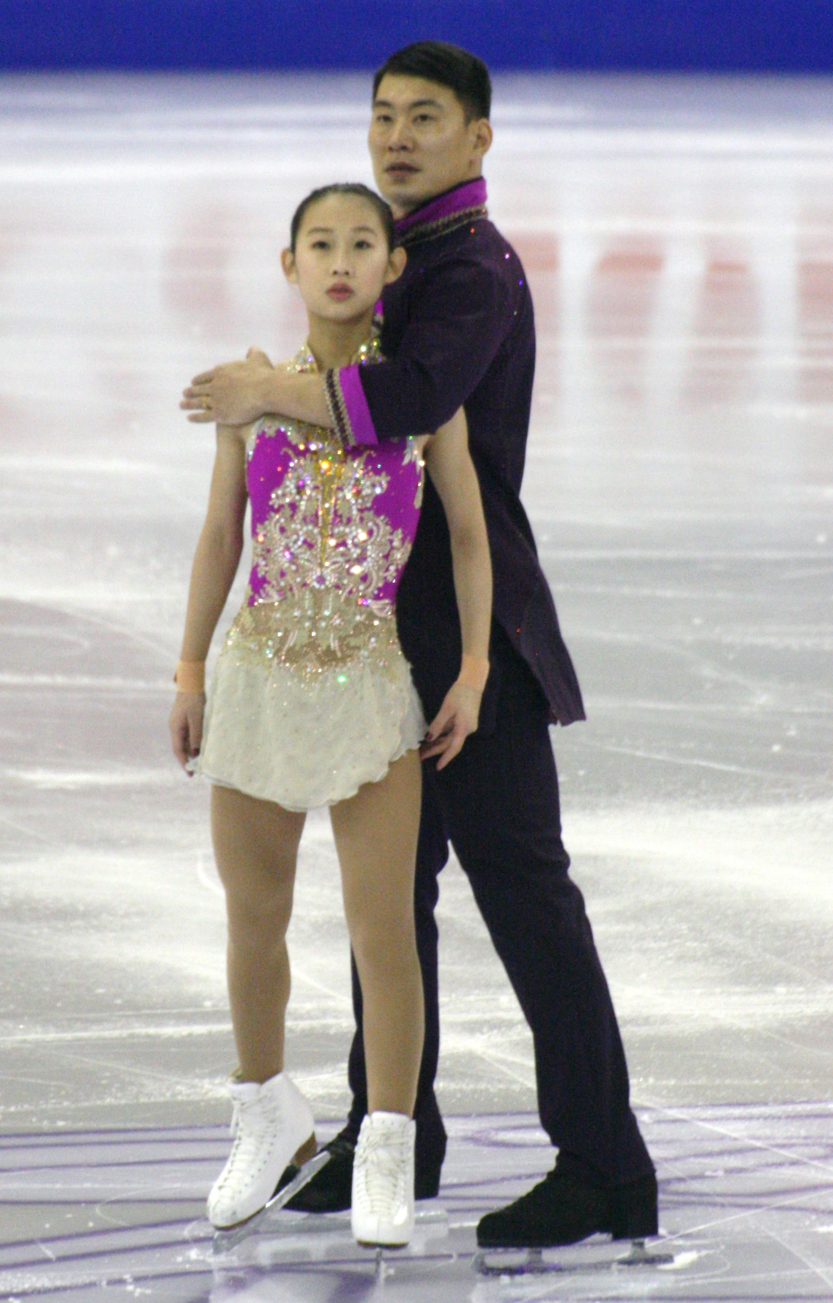 Пэн Чэн и Чжан Хао (Китай) на финале Гран-при по фигурному катанию 2015-2016.